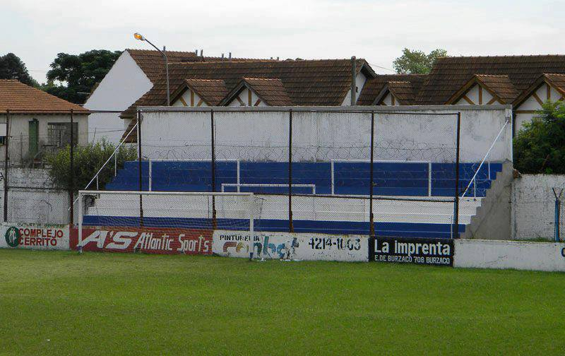 Tribuna visitante del Estadio Francisco Boga, de San Martin de Burzaco